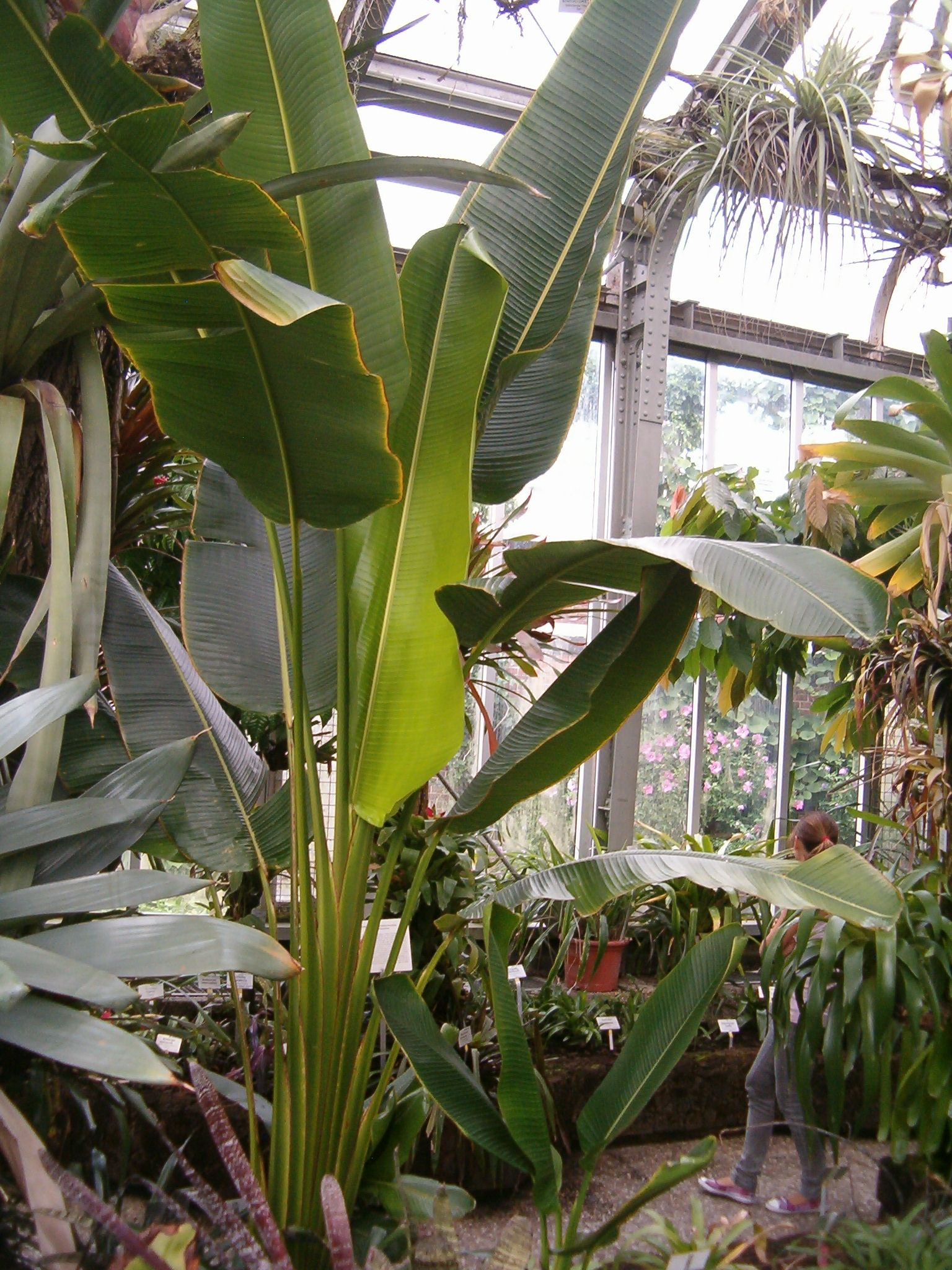 At Botanical Gardens Berlin Dahlem Phenakospermum guyannense